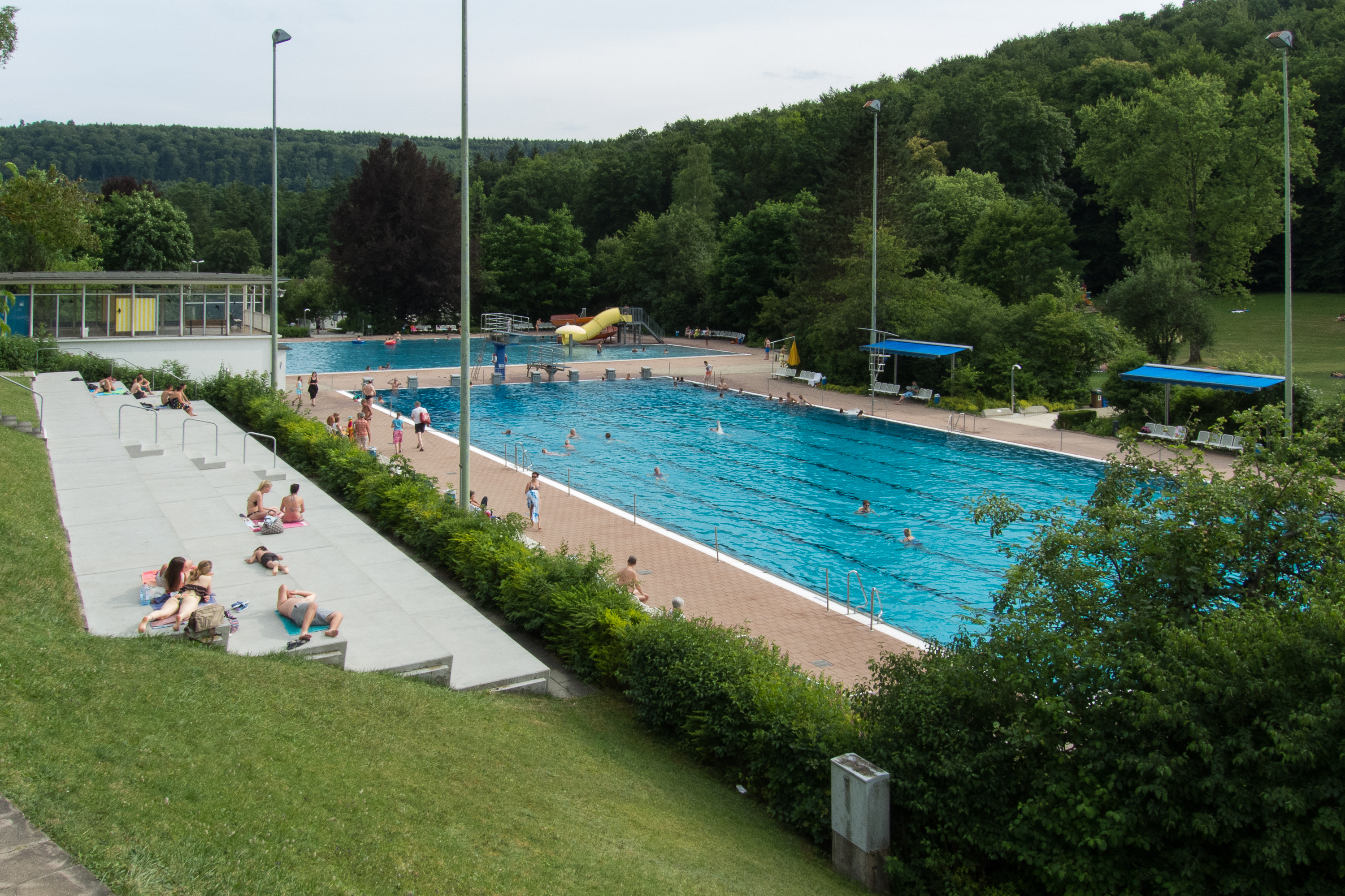 Das Waldfreibad Heidenheim am 12. Juli 2015.